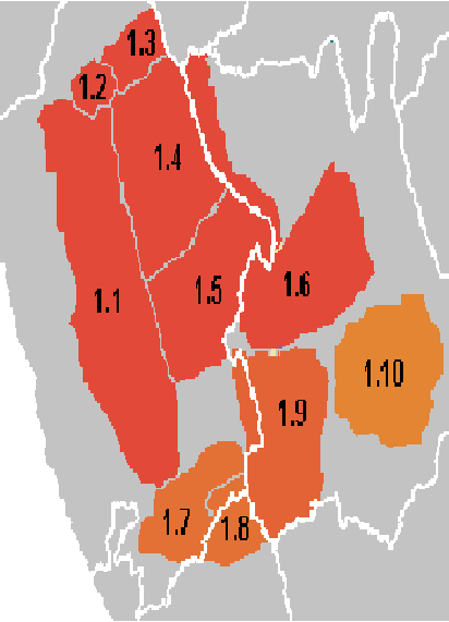 distribución geográfica del quechua ancashino